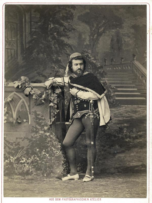 Gustav Walter (1834–1910)